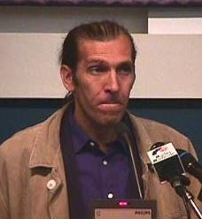 Il giornalista Antonio Russo